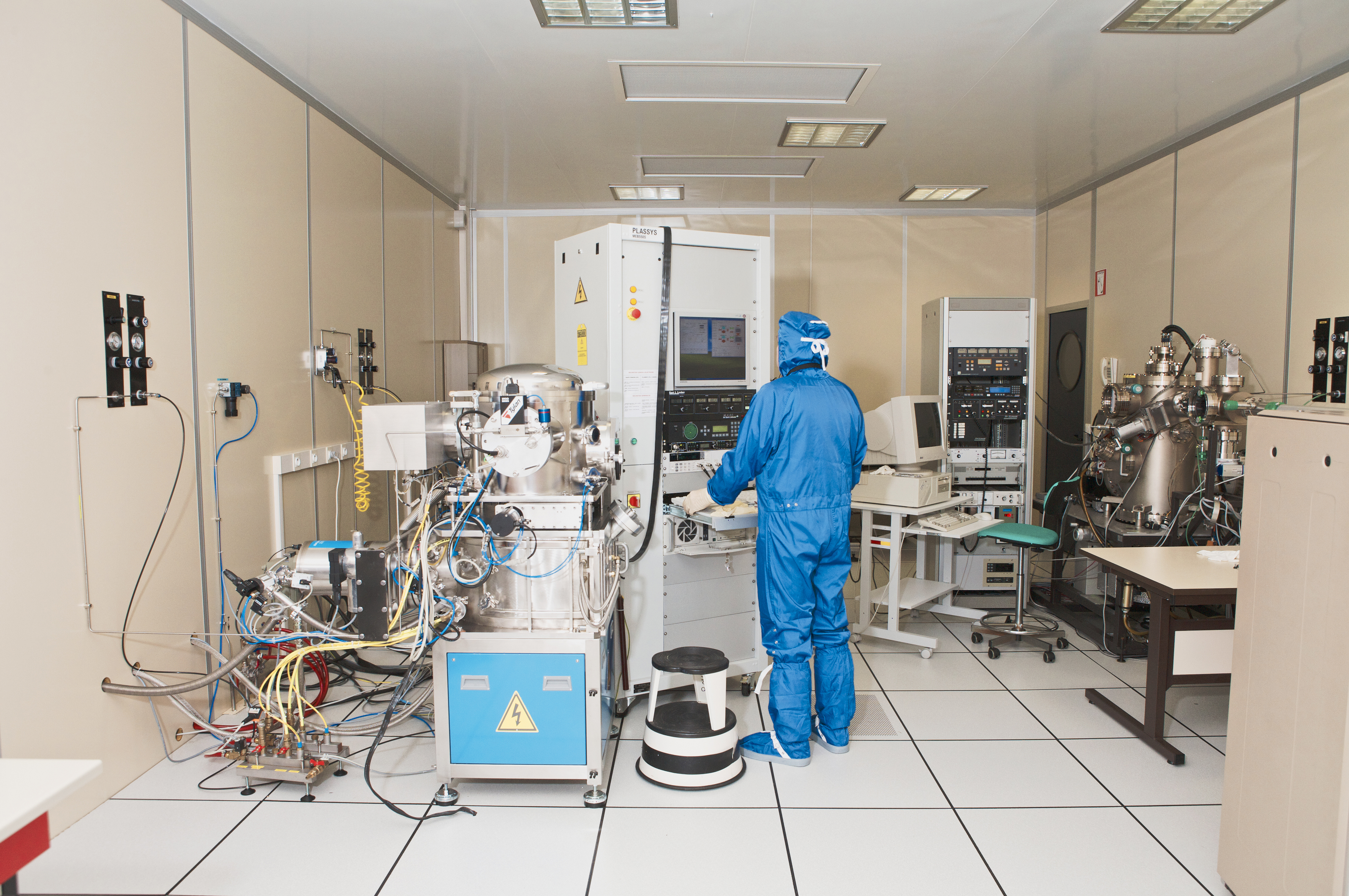 Equipements et environnement de la Centrale de Technologie de l'IEMN